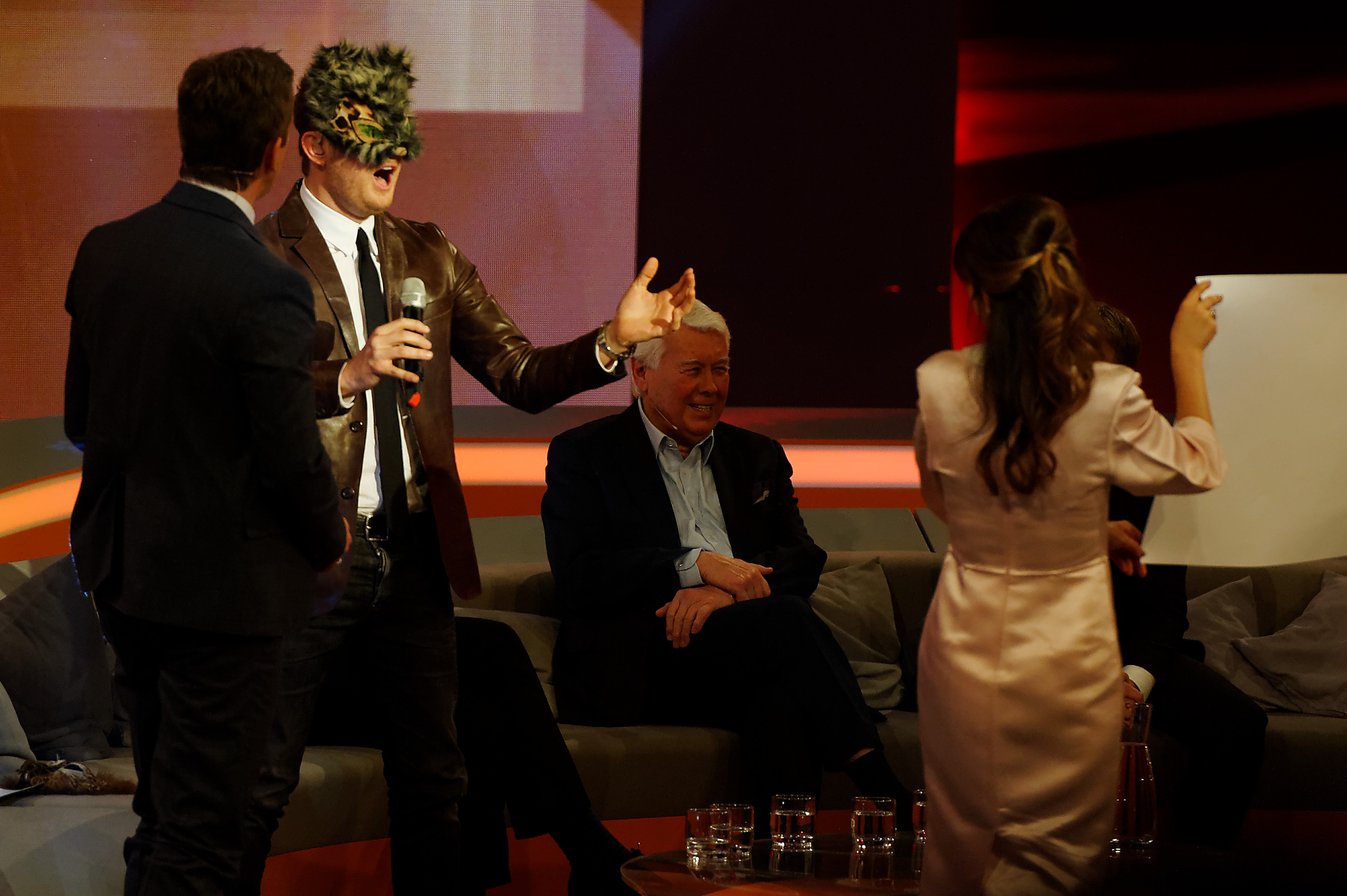 Wetten, dass.. ? am 23. März 2013 in der Stadthalle Wien The making of this document was supported by Wikimedia Austria. Michael Bublé bei der Einlösung seiner Wette